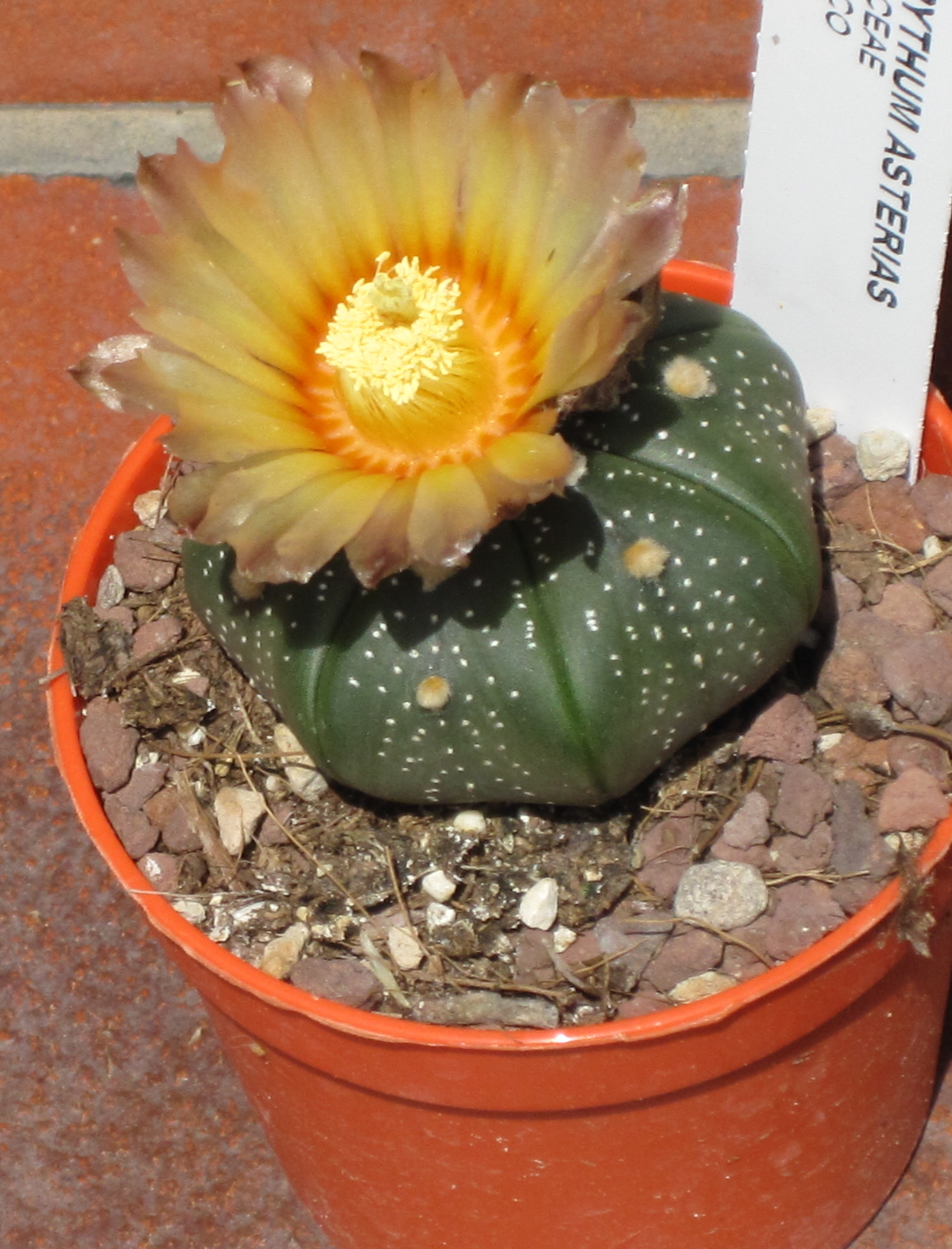 Astrophytum asterias in fiore